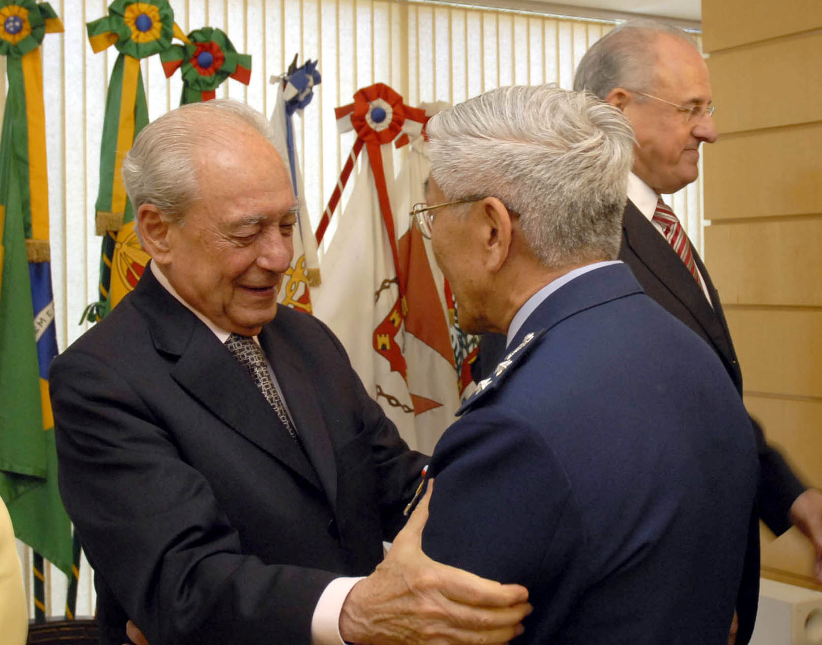 Brasília: cerimônia de transmissão do cargo de Ministro da Defesa, com a saída de Waldir Pires, que recebe os cumprimentos do Comandante da Aeronáutica, Juniti Saito. Ao fundo, o sucessor de Pires, Nelson Jobim.